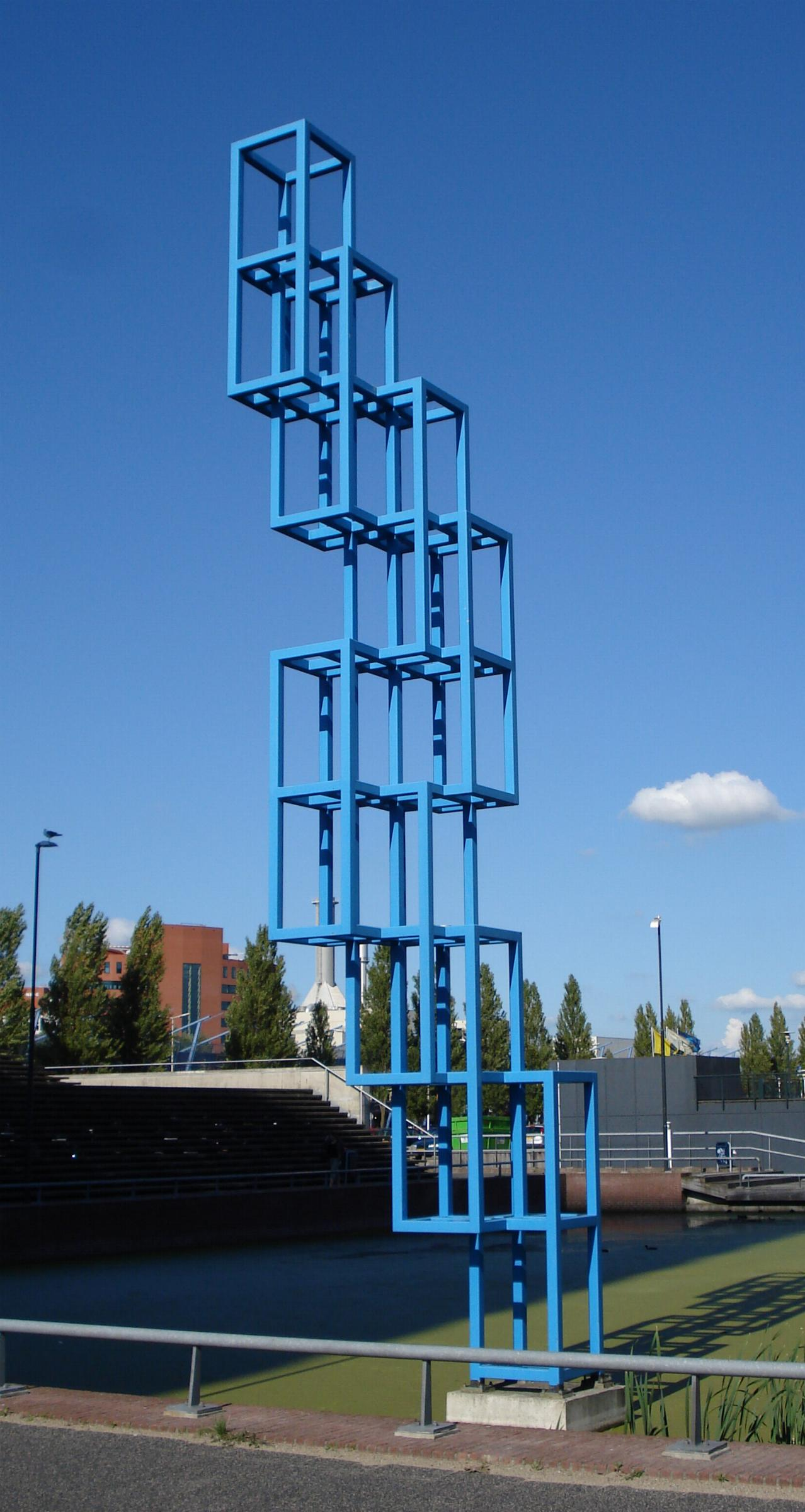 Rotterdam Alexanderpolder, Hoofdweg/Kleine Beer. Kunstwerk "Space time I" van Joost Baljeu. Rotterdam/The Netherlands.